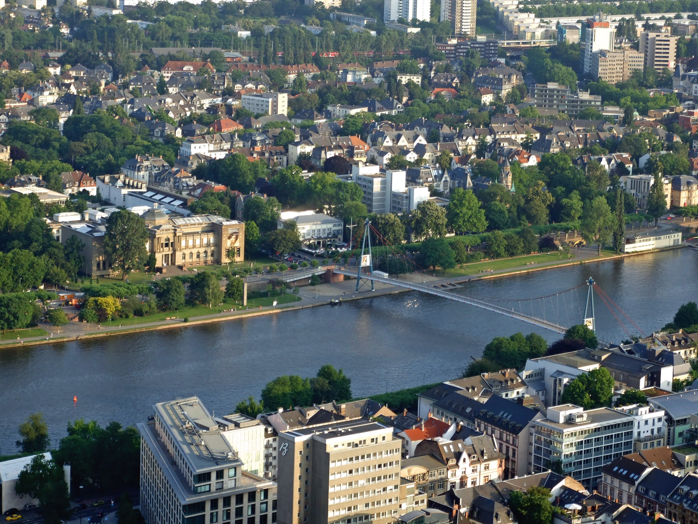 Staedel, links vom Holbeinsteg, am Museumsufer in Ffm